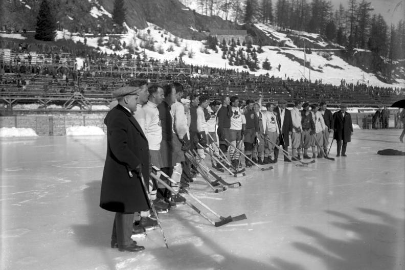 Die große Winter-Olympiade in St. Moritz! Neueste Aufnahmen von unserem nach St. Moritz entsandten Sonder-Bild-Berichterstatter. Olympische Eishockeyspiele in St. Moritz! Die canadische und schwedische Eishockeymannschaft nach dem großen Siege der Canadier, den voraussichtlichen Olympia-Siegern.